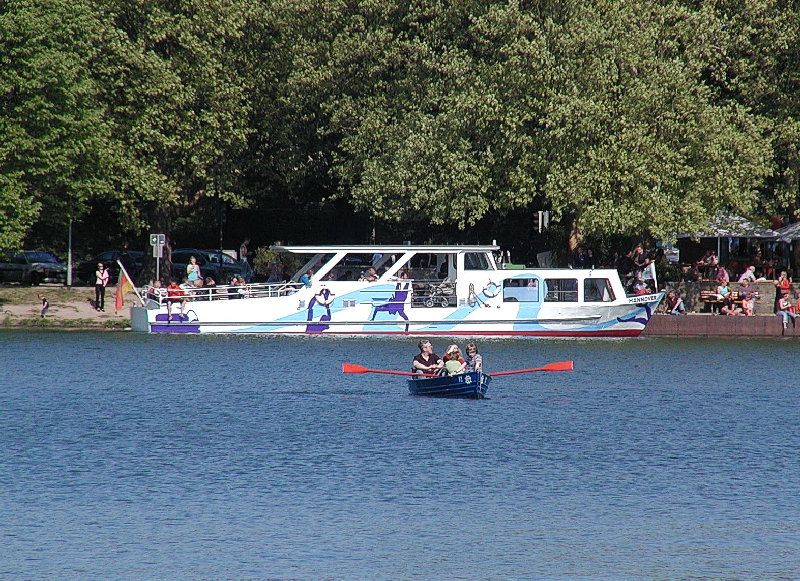 Fahrgastschiff "Hannover" auf dem Maschsee in Hannover